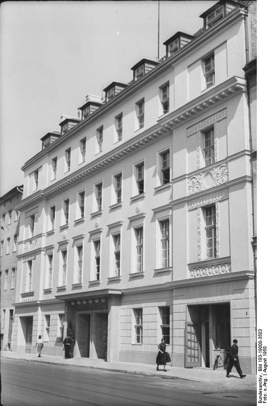 Berlin, Gebäude der Volkskammer ADN-Zentralbild-Archiv 11.8.1950 Das neue Haus der Volksammer in der Luisenstrasse in Berlin